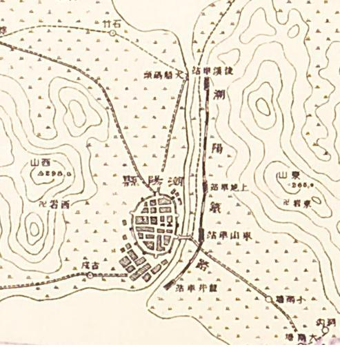 中文（香港）: 潮阳铁路路线图